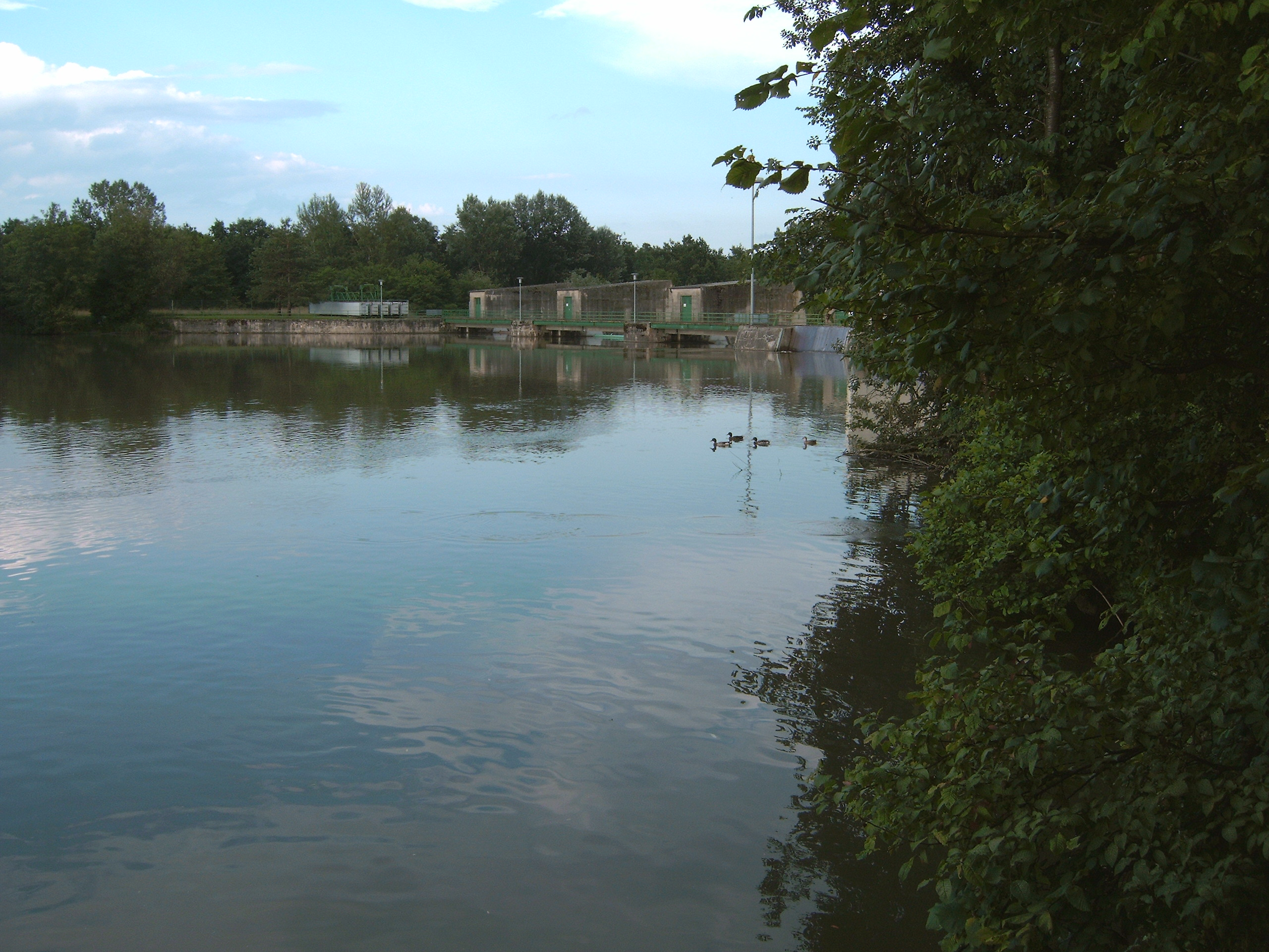 Wasserkraftwerk bei Gralla